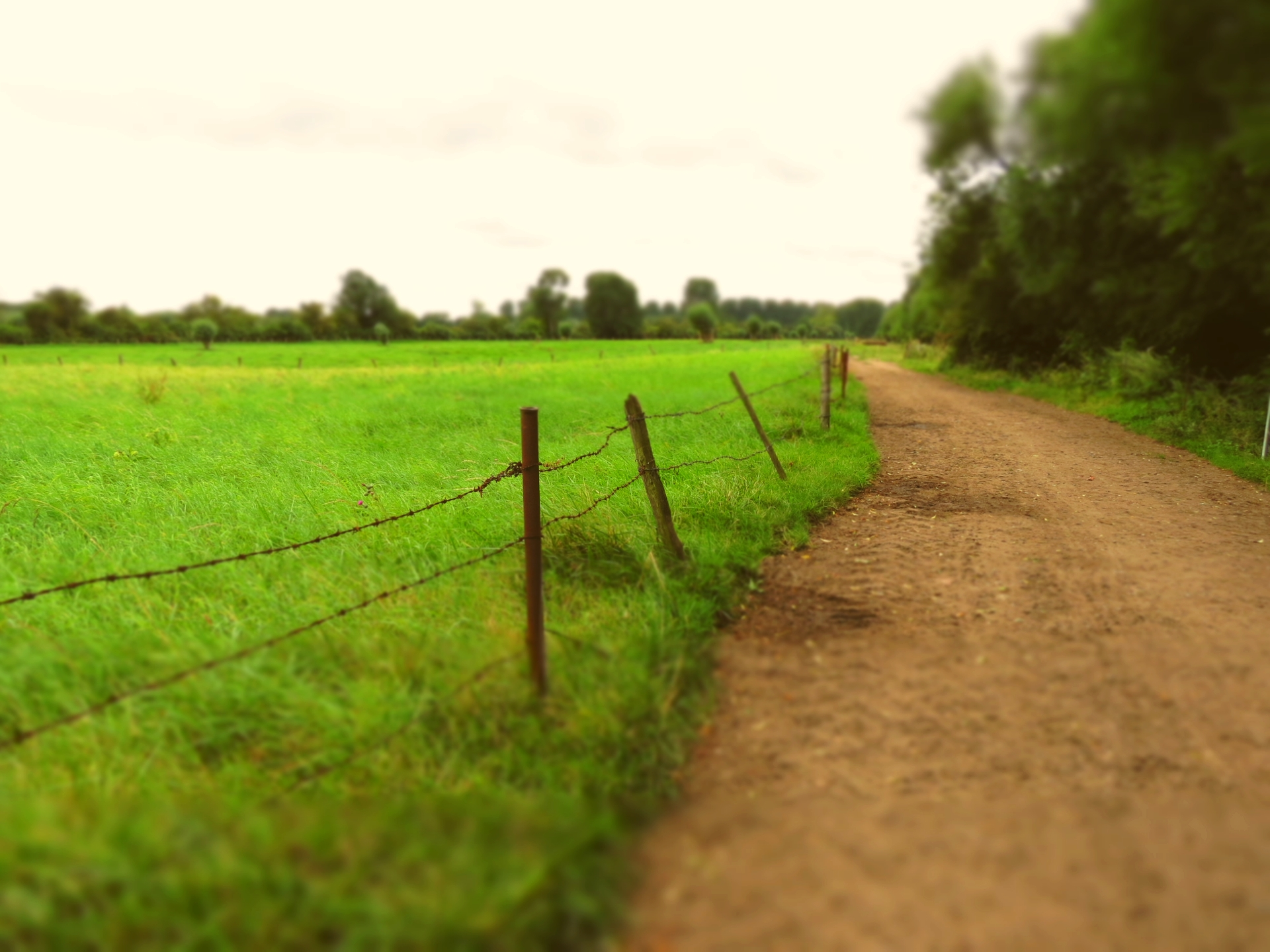 Am Himmelgeister Rheinbogen